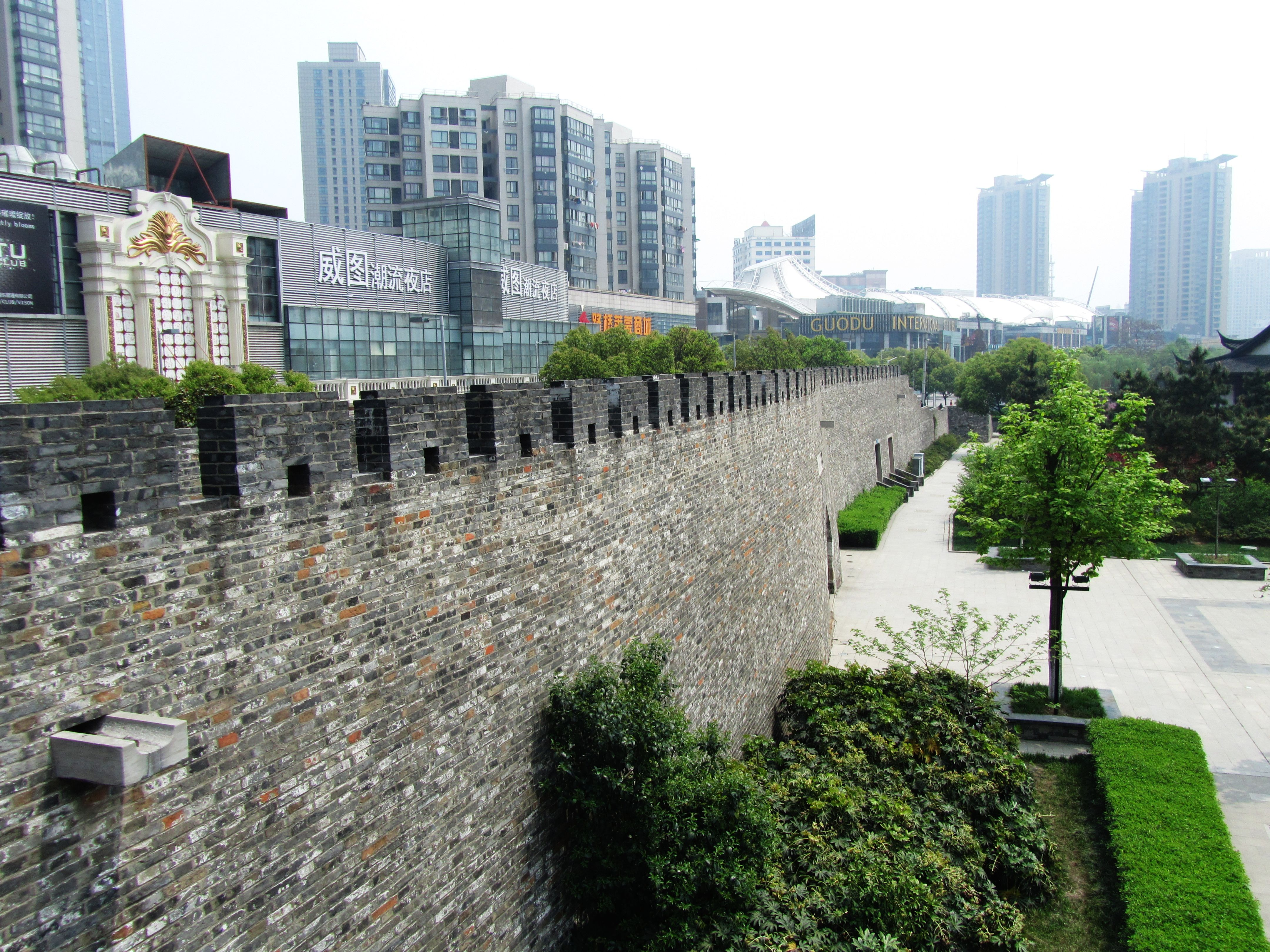 常州城墙西瀛门段，自城墙之上俯瞰东段城外部分（南侧）。